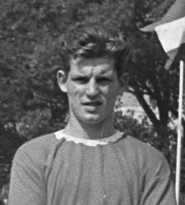 Bennie Hofs.